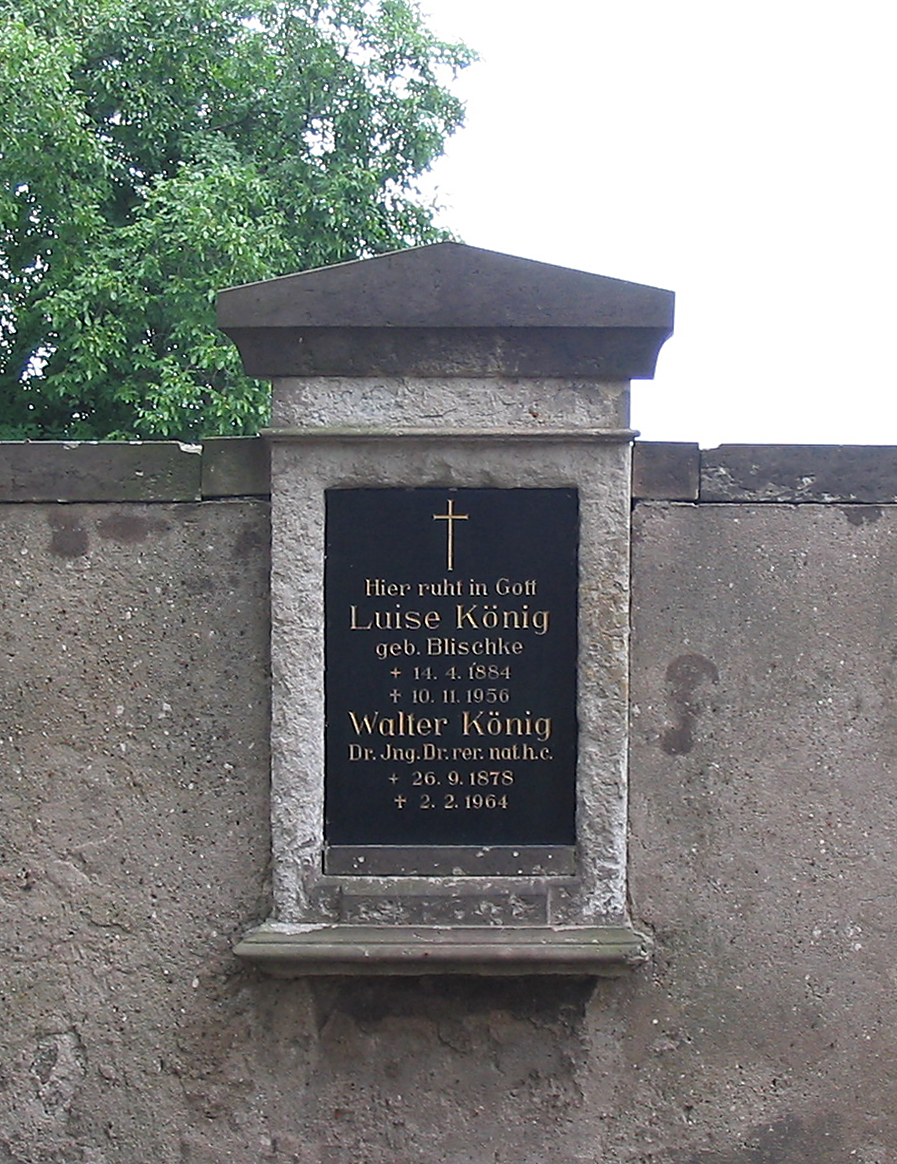 Friedhof Radebeul-West, Grabmal Walter König